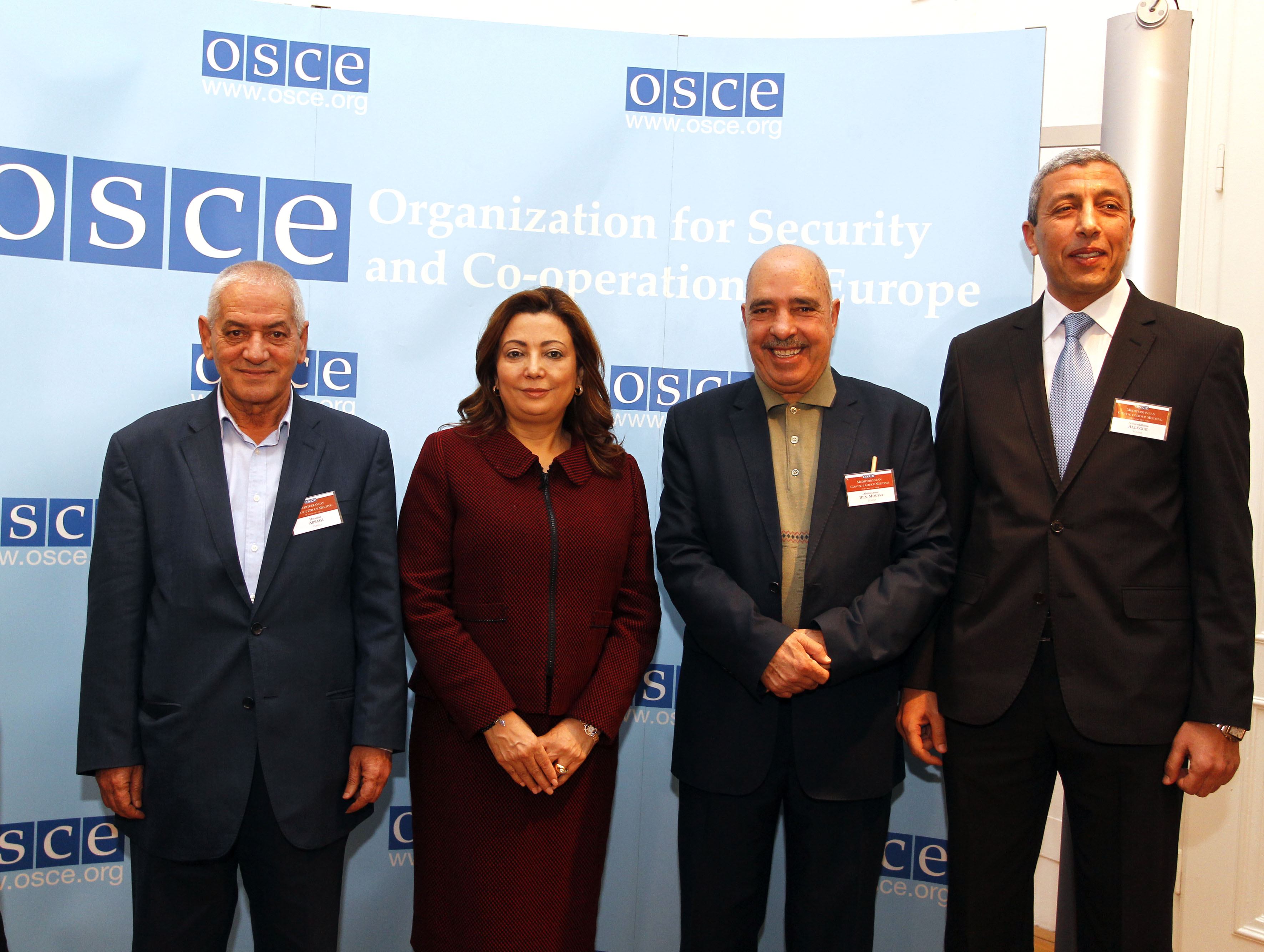 Besuch des quartetts der Tunesischen Friedensnobelpreisträger in Wien Foto: Mahmoud